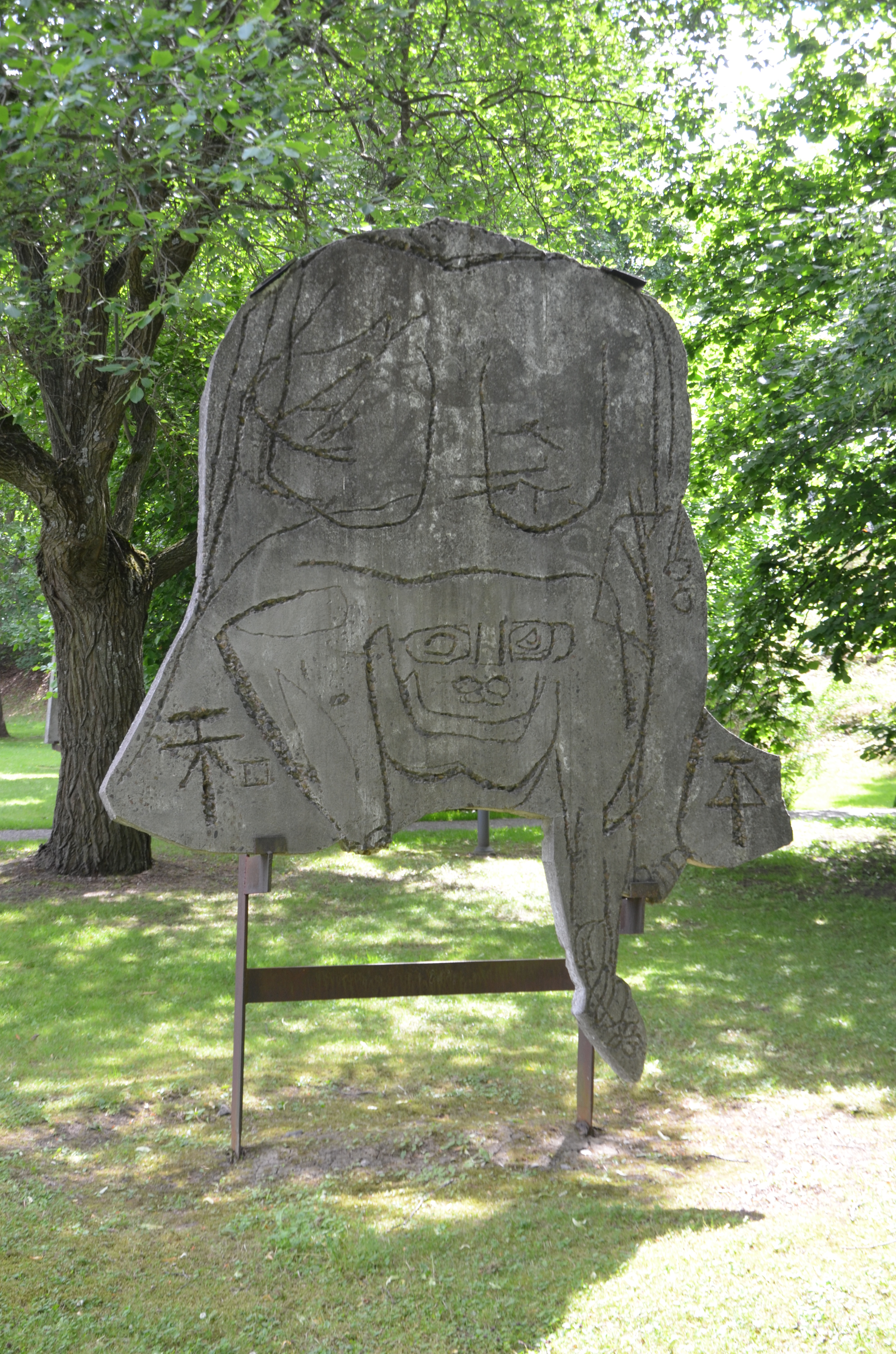 Siri Derkert: ristningar i betong utanför Älvsjömässan i Älvsjö i Stockholm